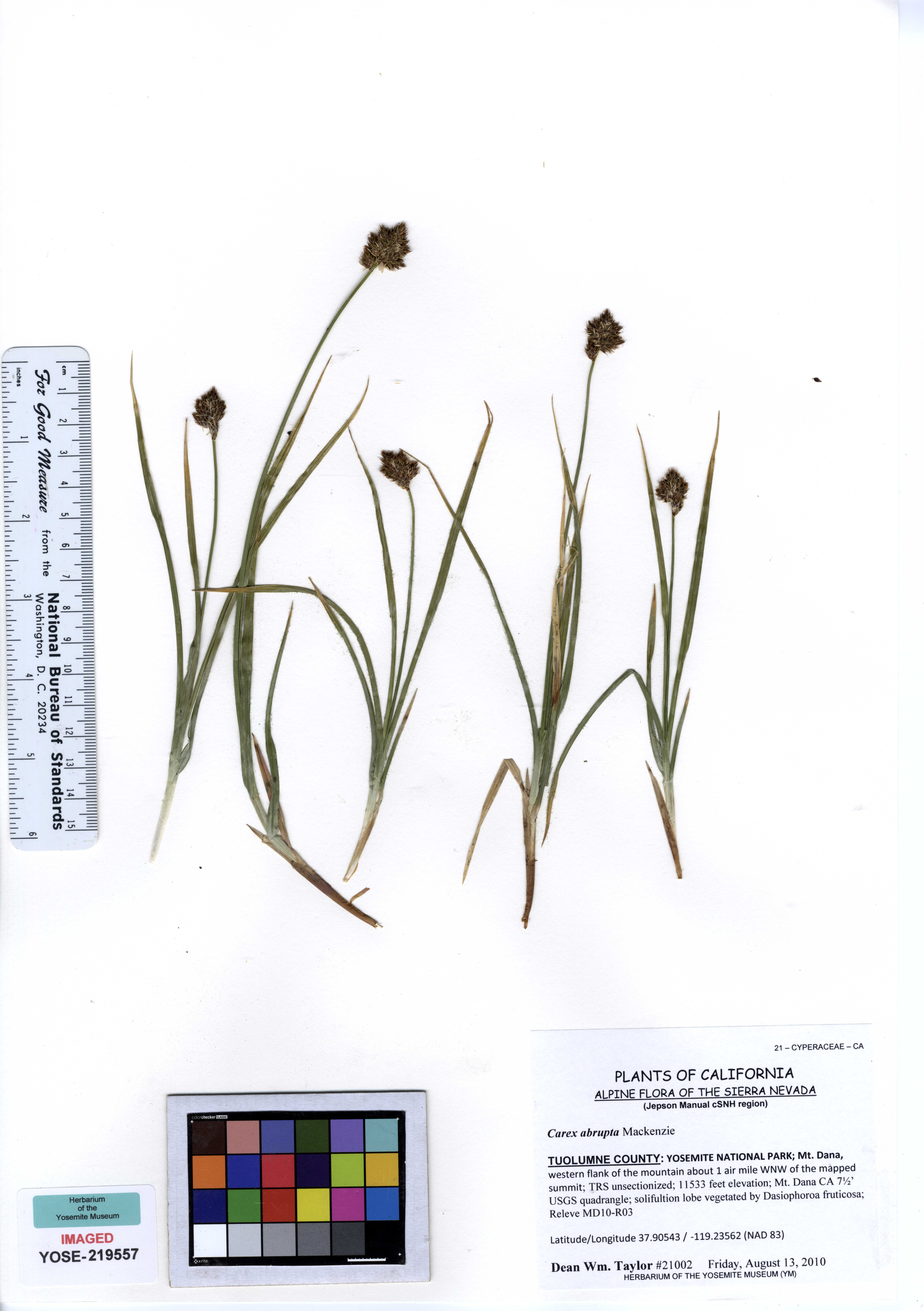 YOSE219557 Carex abrupta